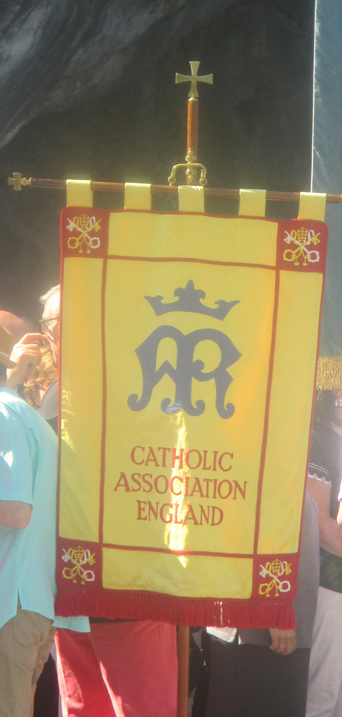 Bannière de la Catholic Association à Lourdes.